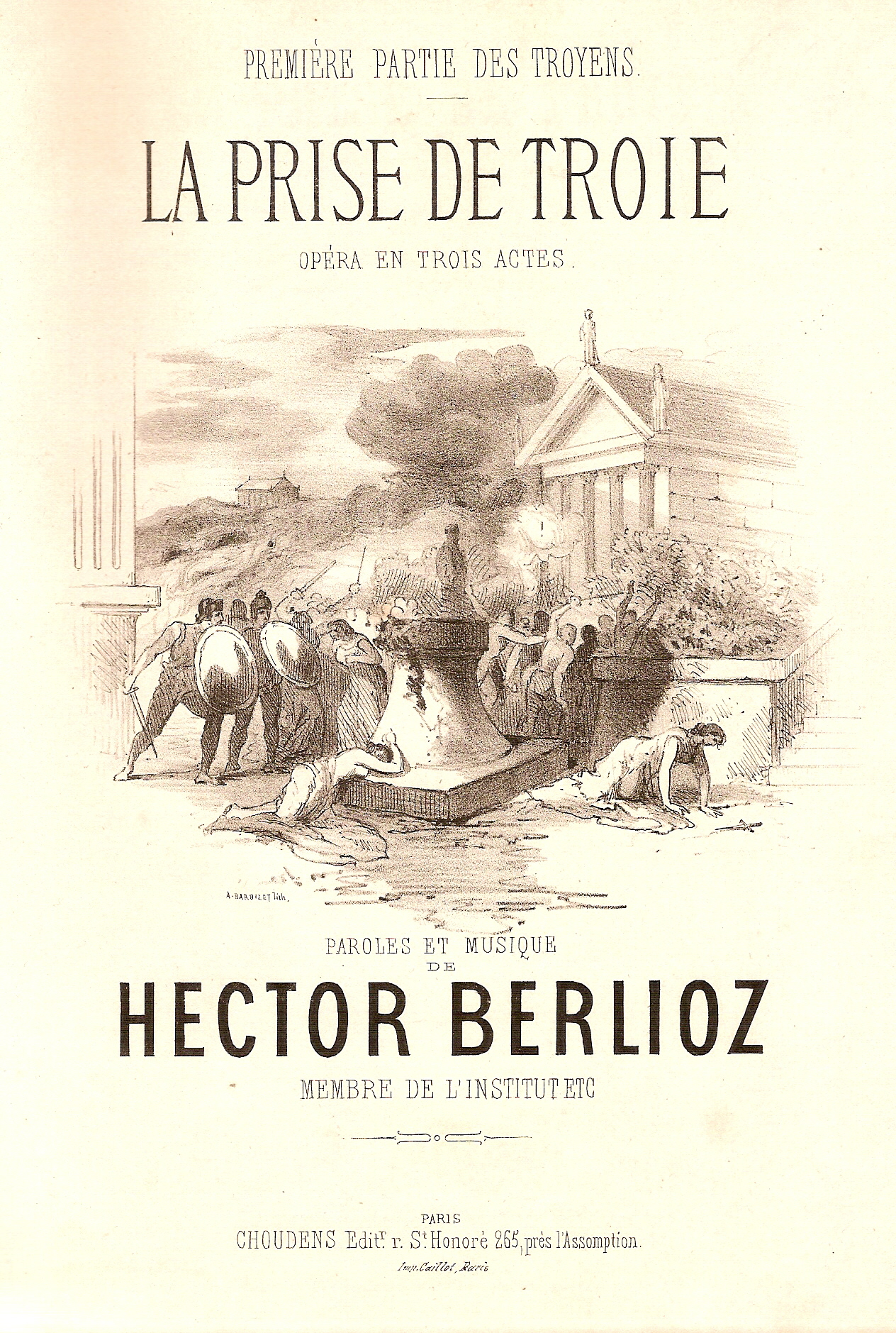 Title Page Les Troyens